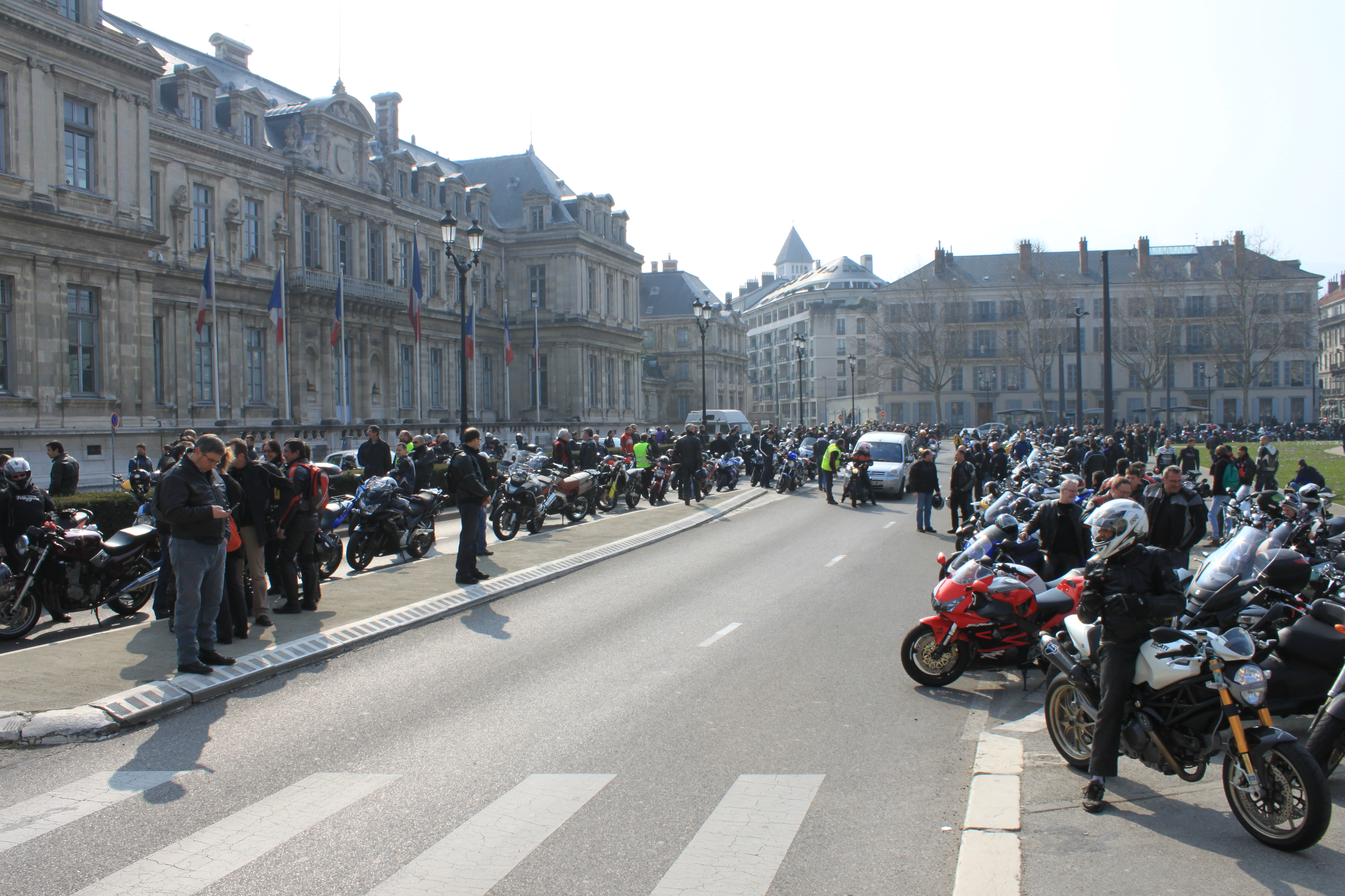 Manifestion FFMC, le 13 mars 2010 à Grenoble